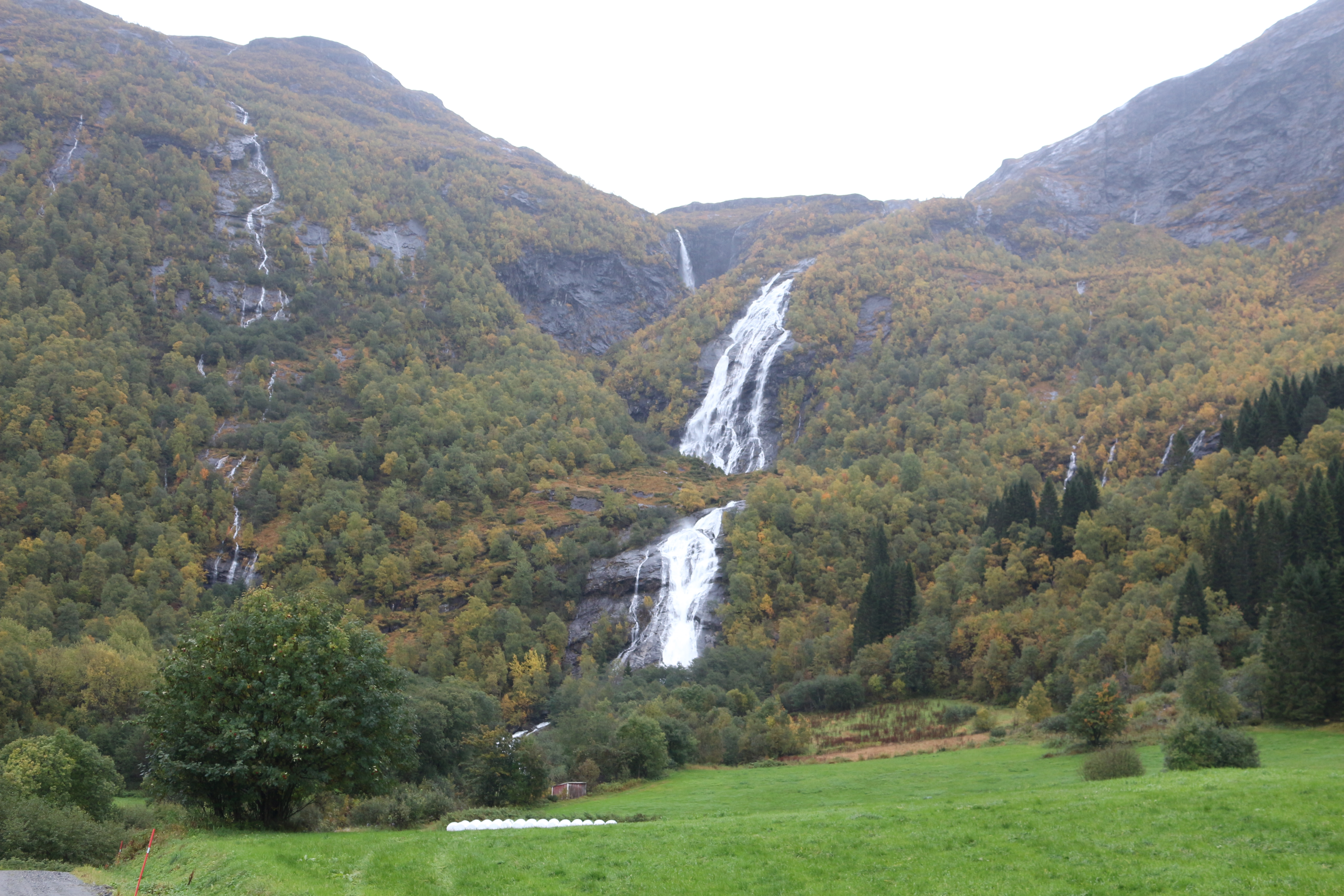 Tyssefossen